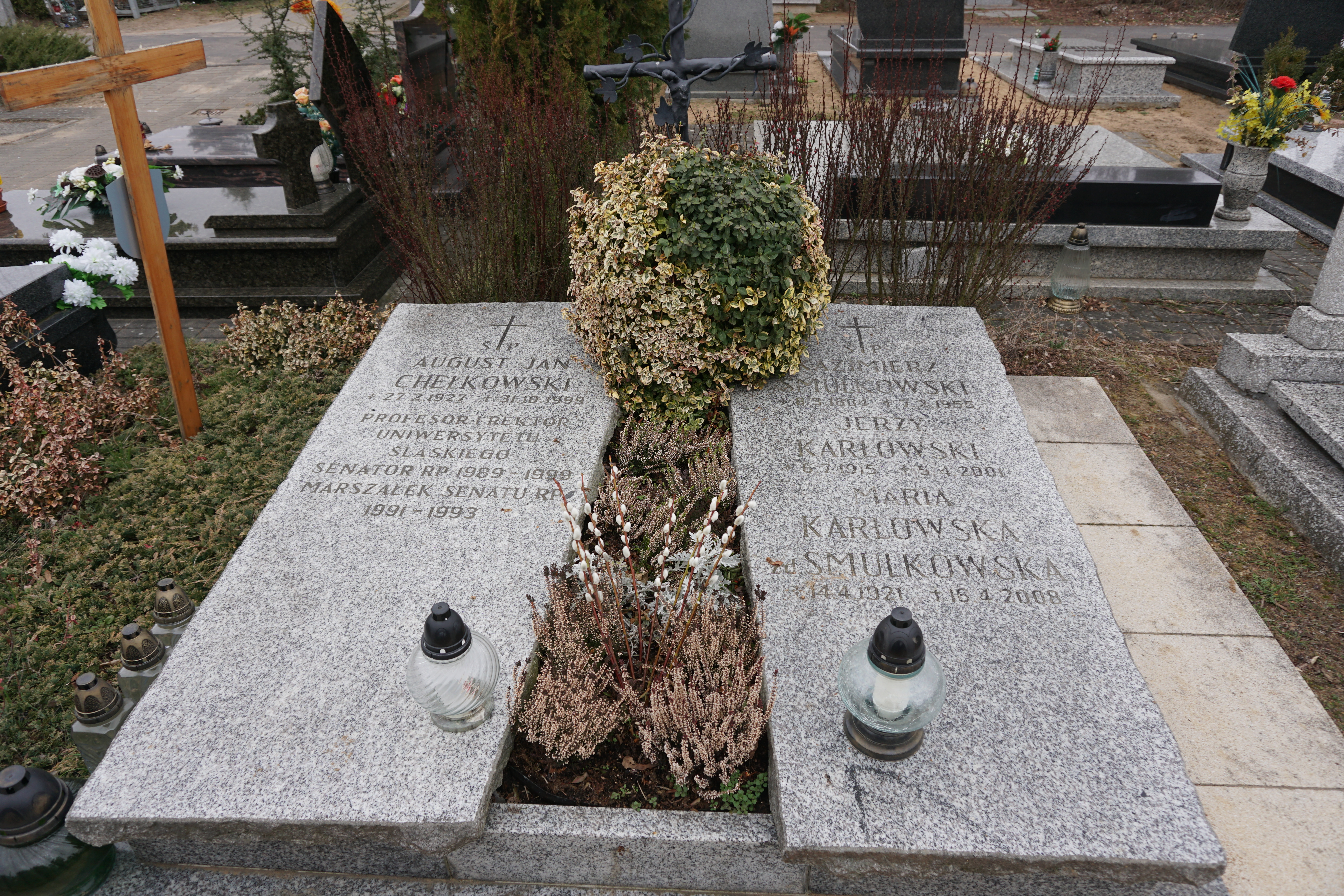 Grób prof. Augusta Chełkowskiego na Cmentarzu Junikowskim